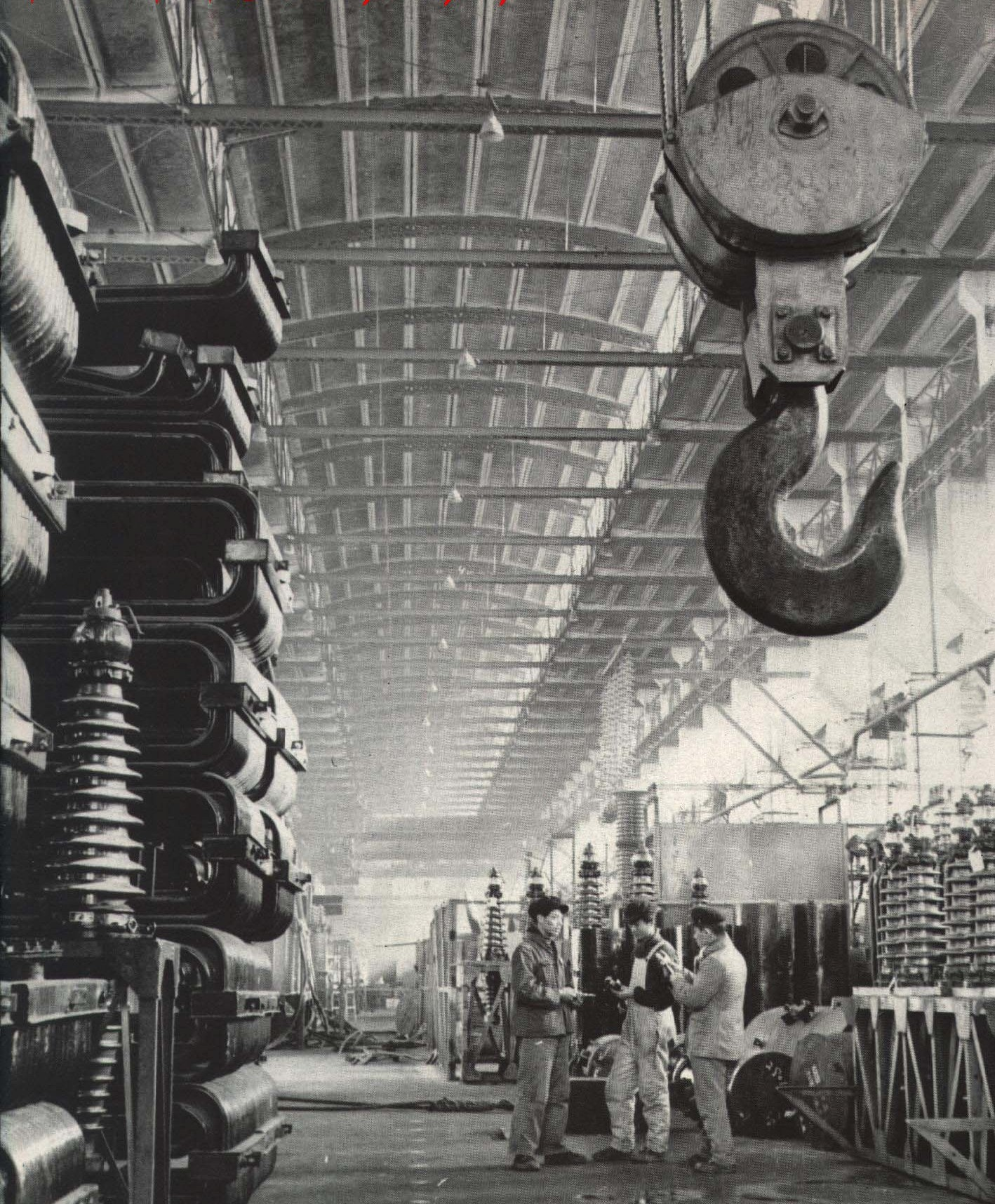 1963-07 1963年 沈阳变压器厂